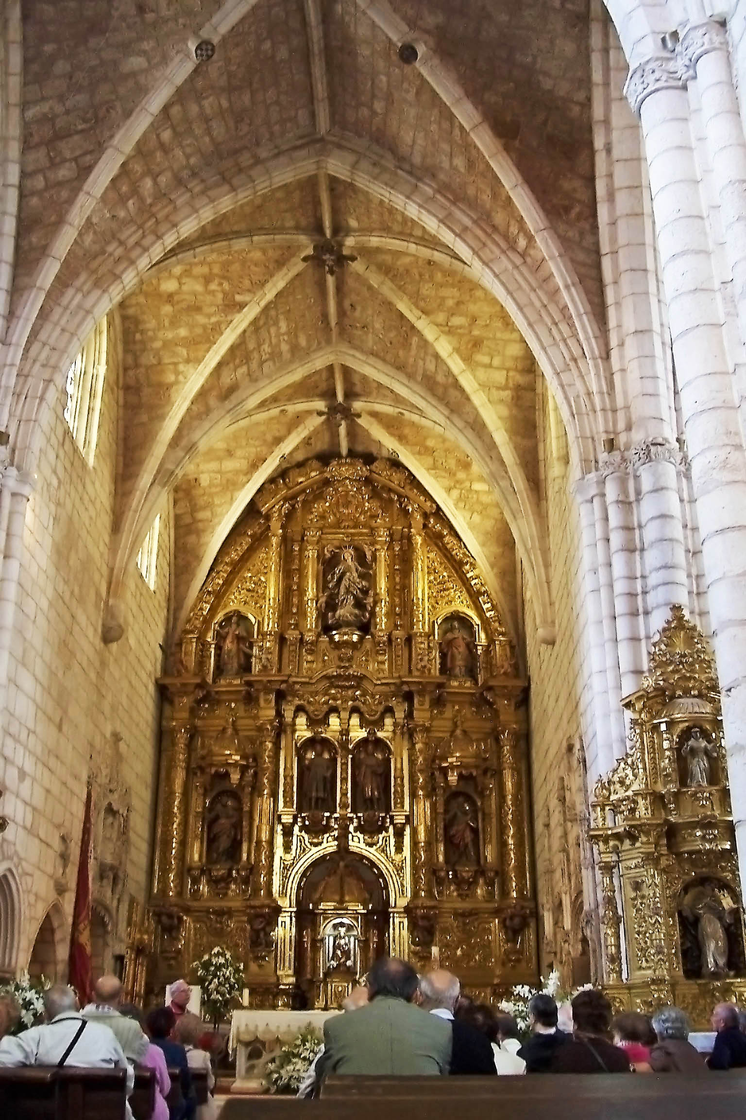 Retablo mayor de la Colegiata de Covarrubias (Burgos, España). Es un edificio tardogótico, cuyas obras empezaron en 1474 por encargo del abad Diego Fernández, capellán del rey Enrique IV. De elegantes proporciones y planta de cruz latina, con tres naves y crucero, acoge entre sus muros los panteones de numerosas familias ilustres de la villa.